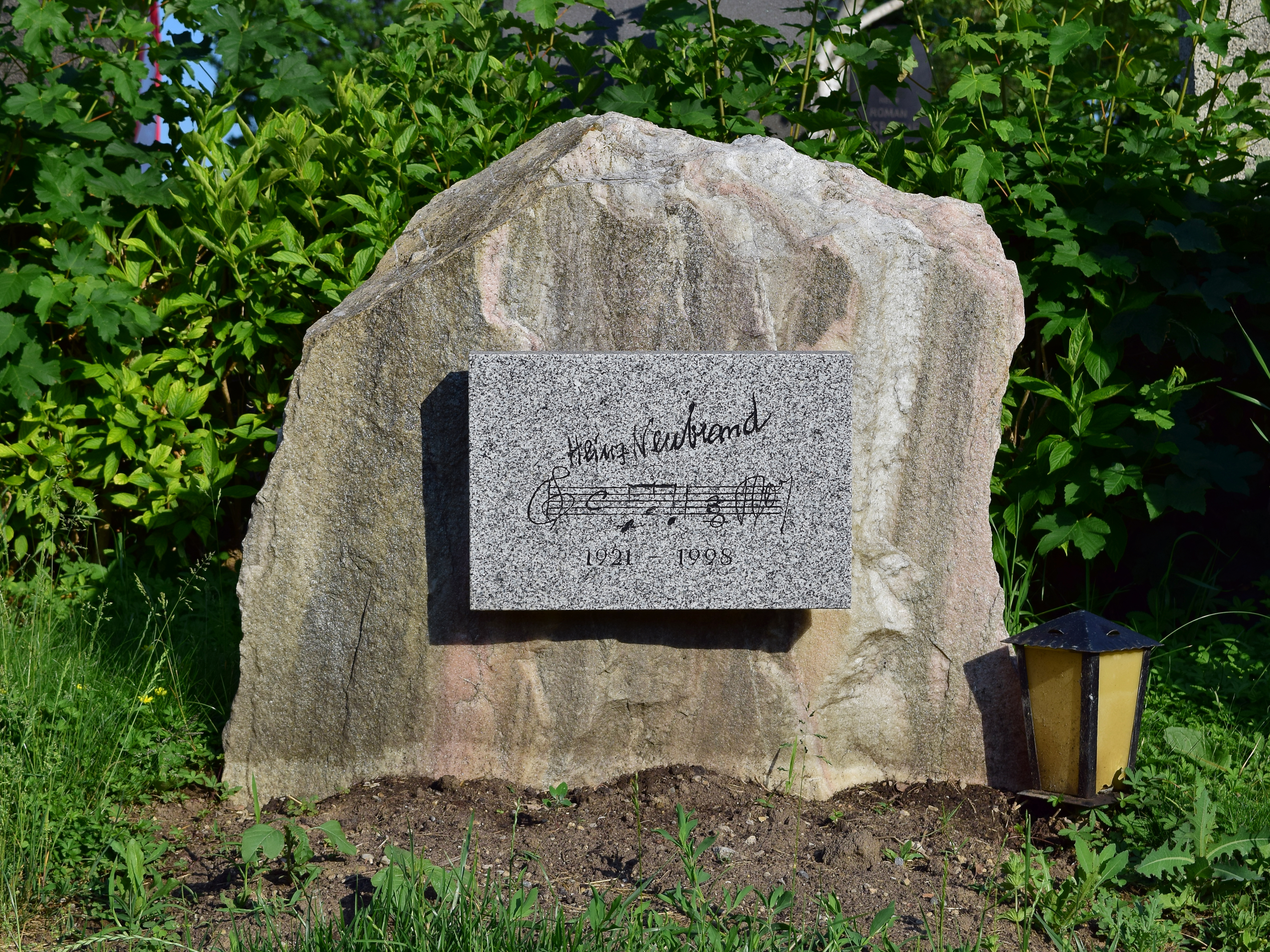 Ehrenhalber gewidmetes Grab von Heinz Neubrand auf dem Wiener Zentralfriedhof, Gruppe 40.